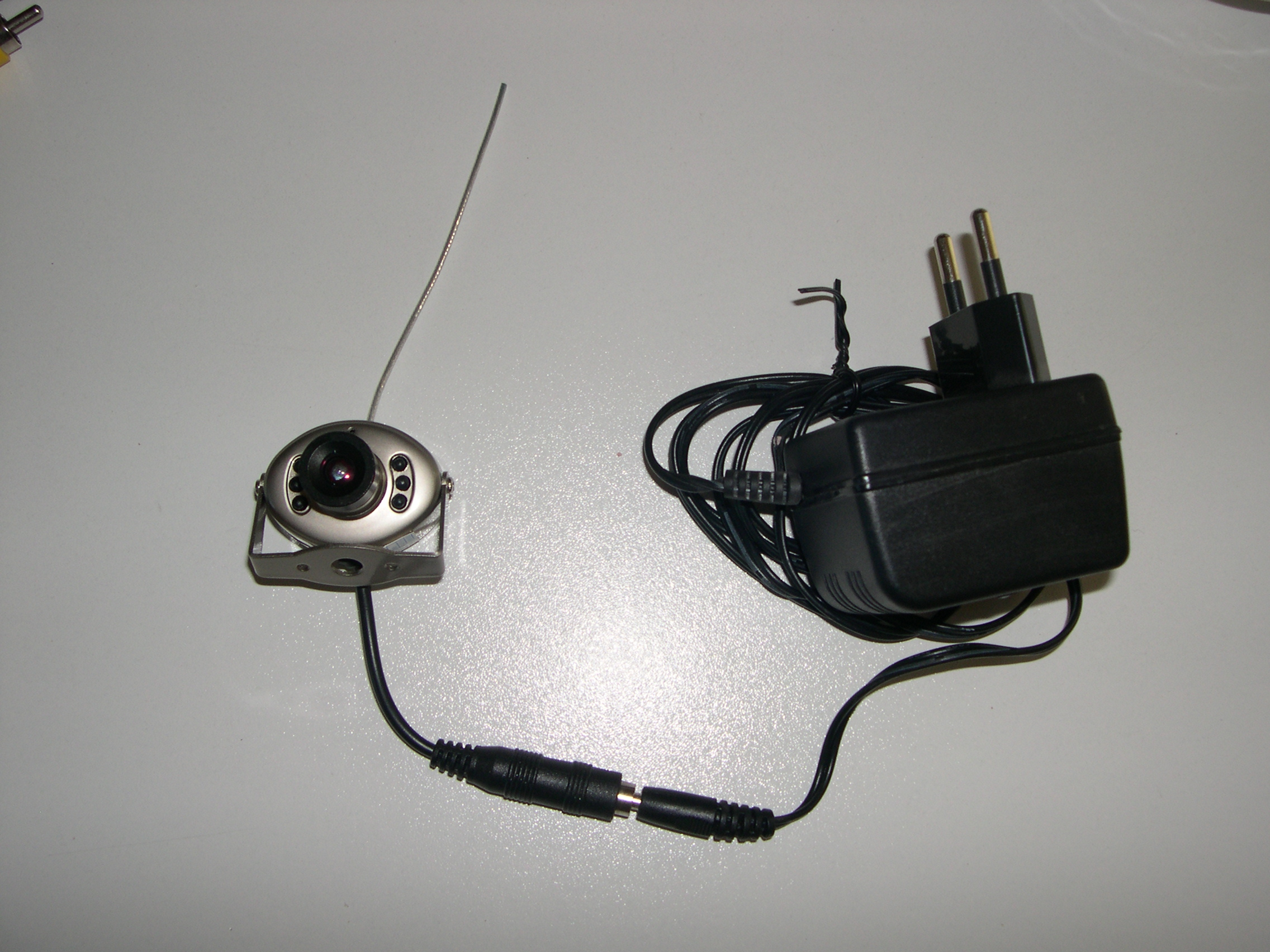 Camera couleur sans-fil bande UHF. Antenne solidaire omnidirectionnelle V. Longueur 86 mm ( = 1/4 d'onde de 860 Mhz ?)